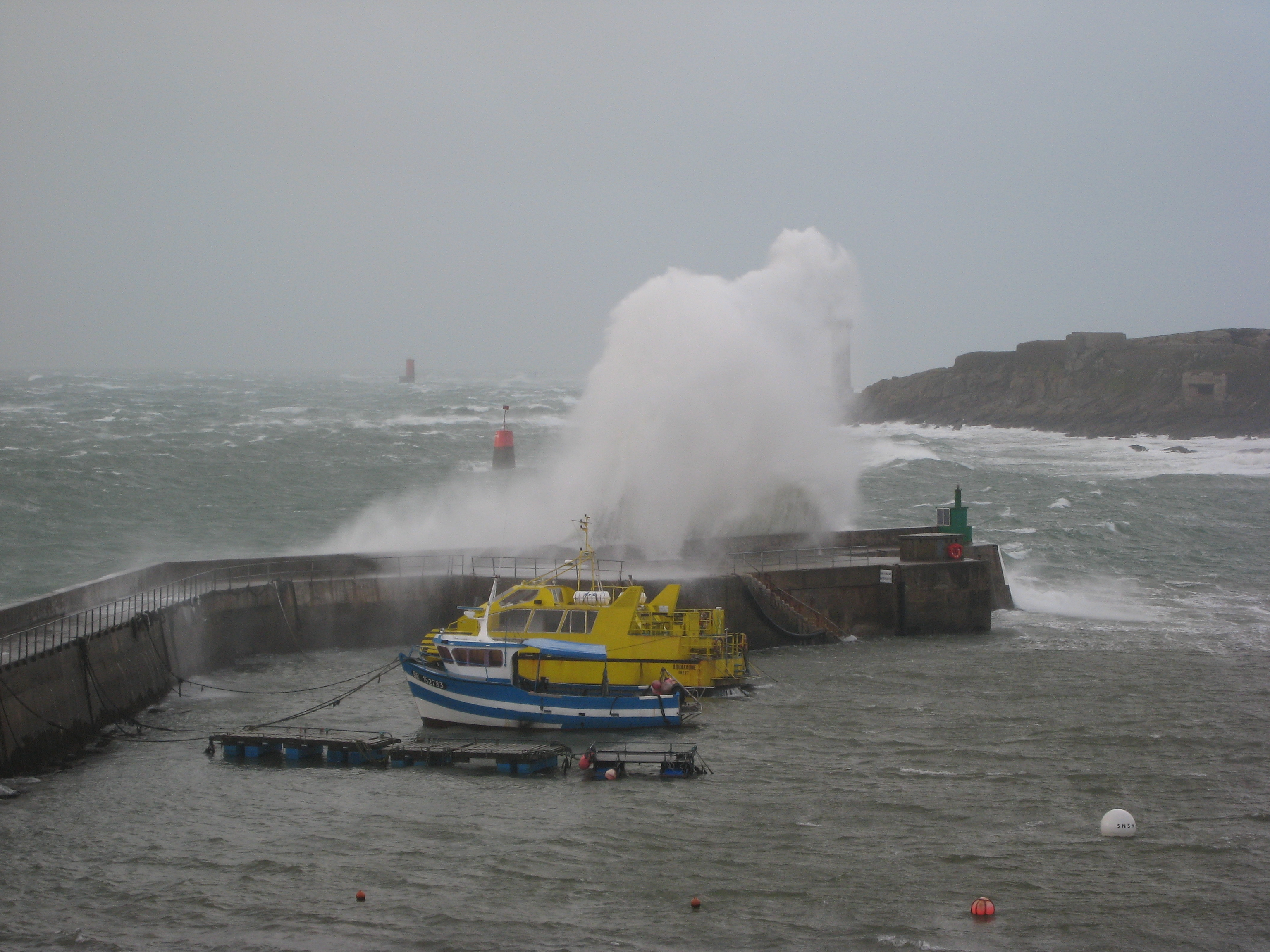 Port du Conquet (Finistère)